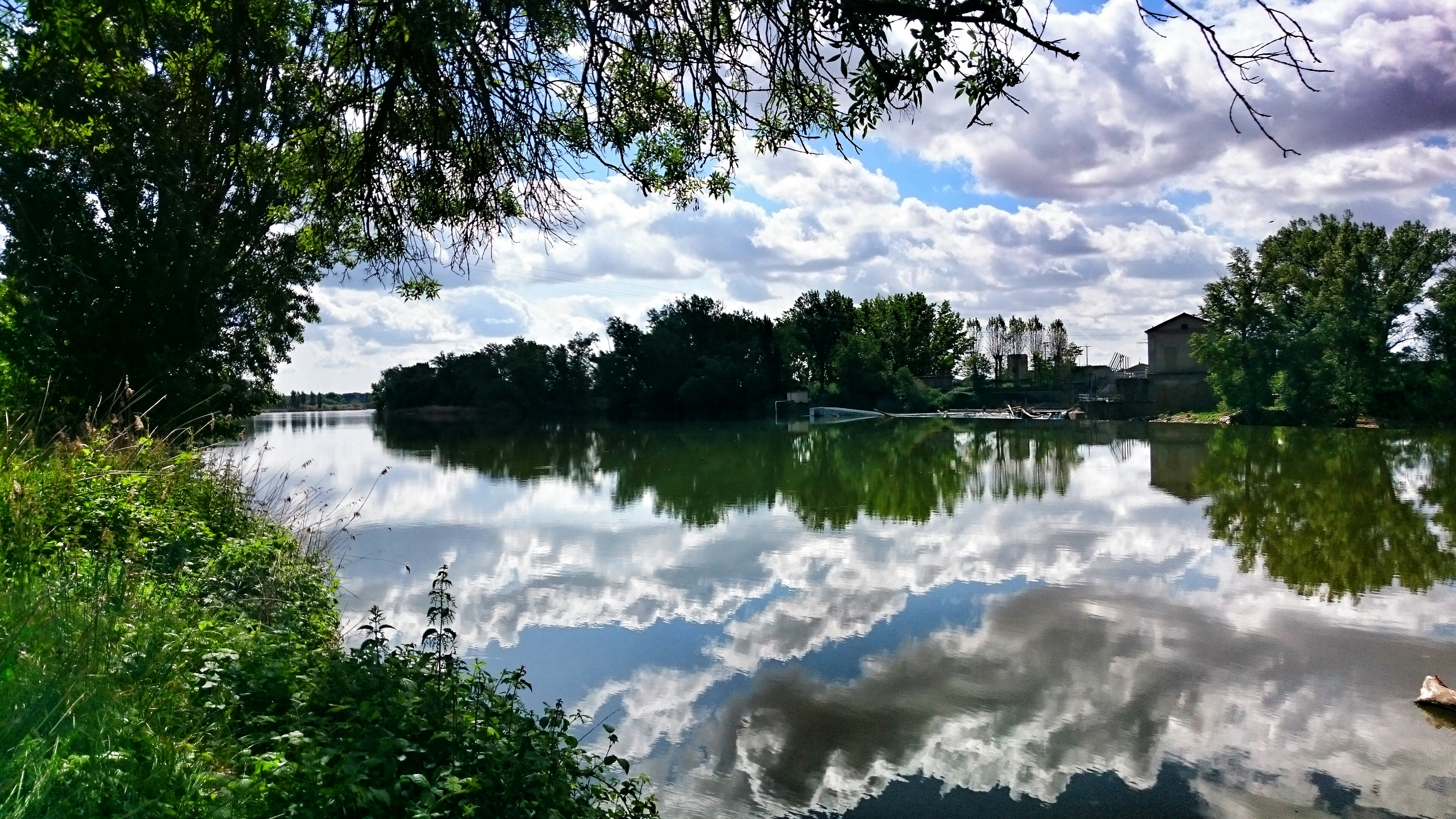 El río Duero a su paso por las inmediaciones de Villamarciel-Vega del Duero Red Natura 2000